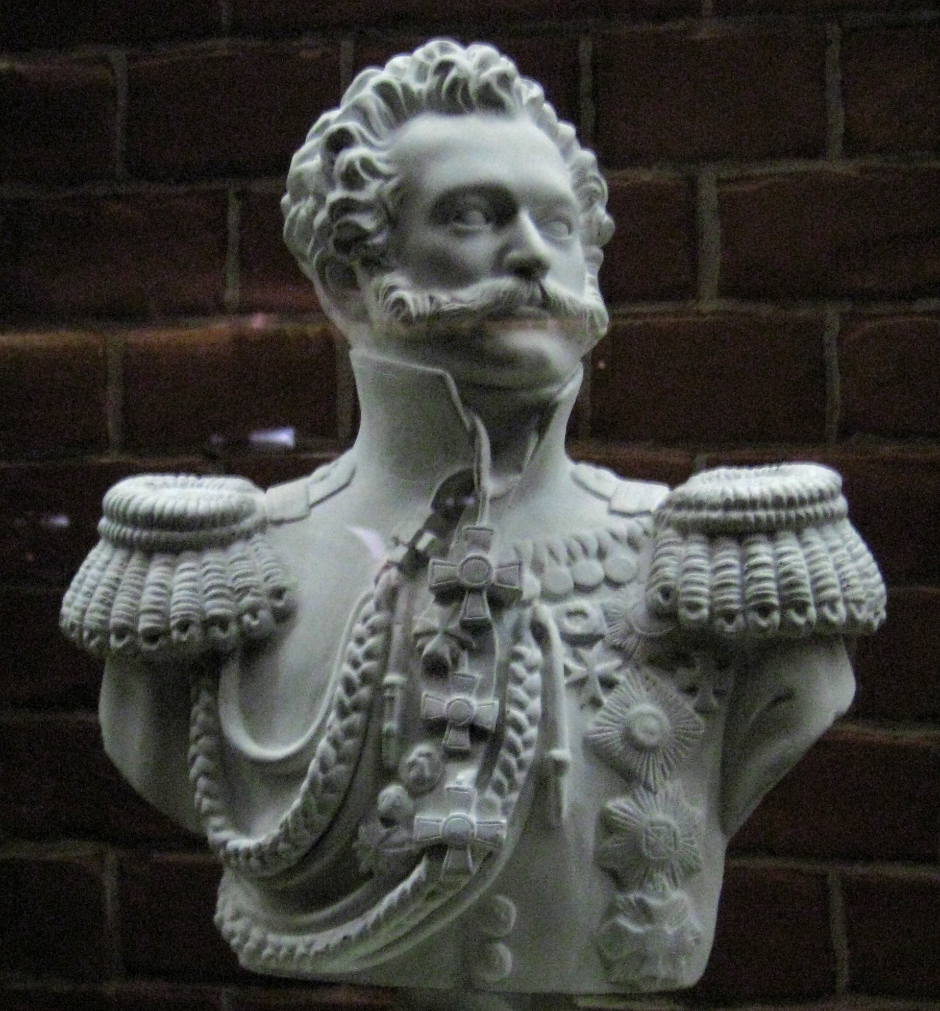 Бюст. Государственный исторический музей. Василий Орлов-Денисов ?